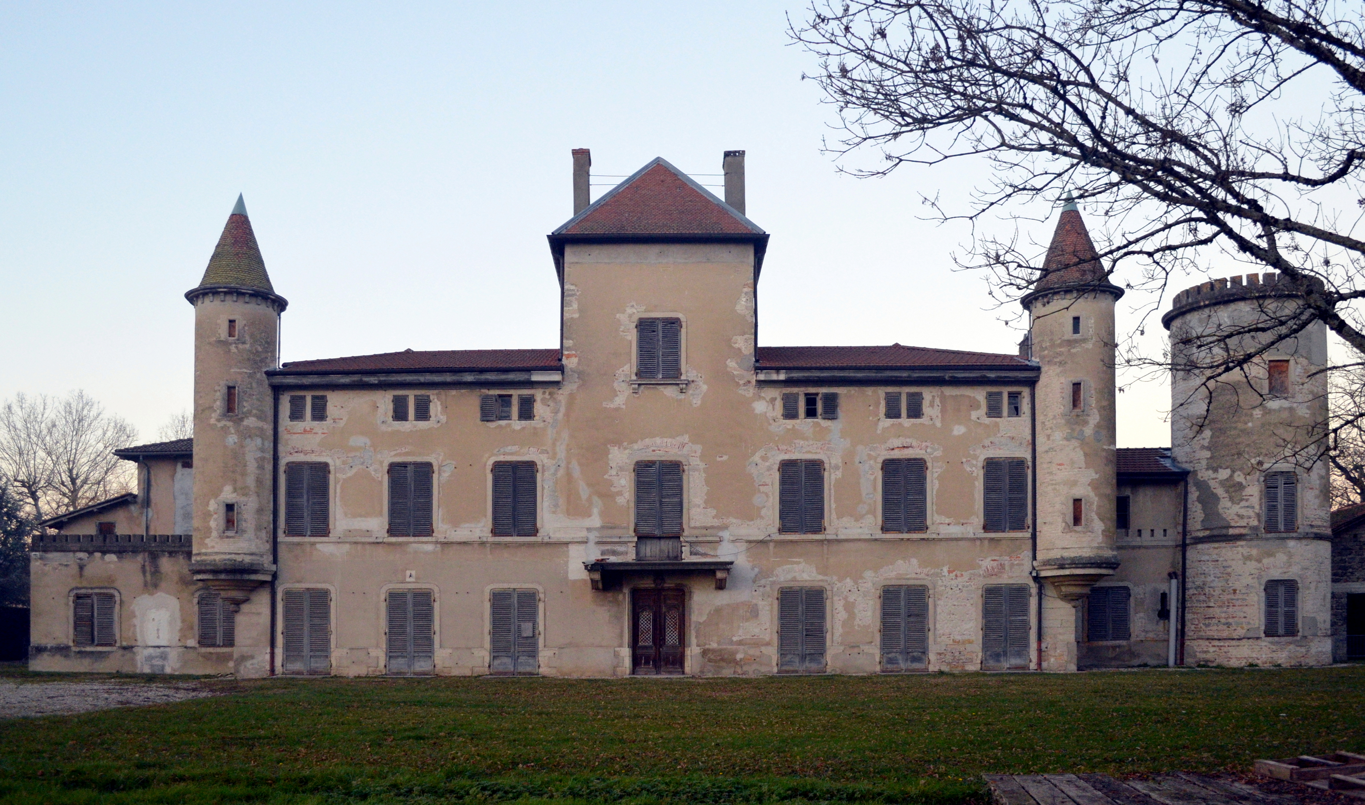 Château Chiloup à Dagneux dans l'Ain en France.